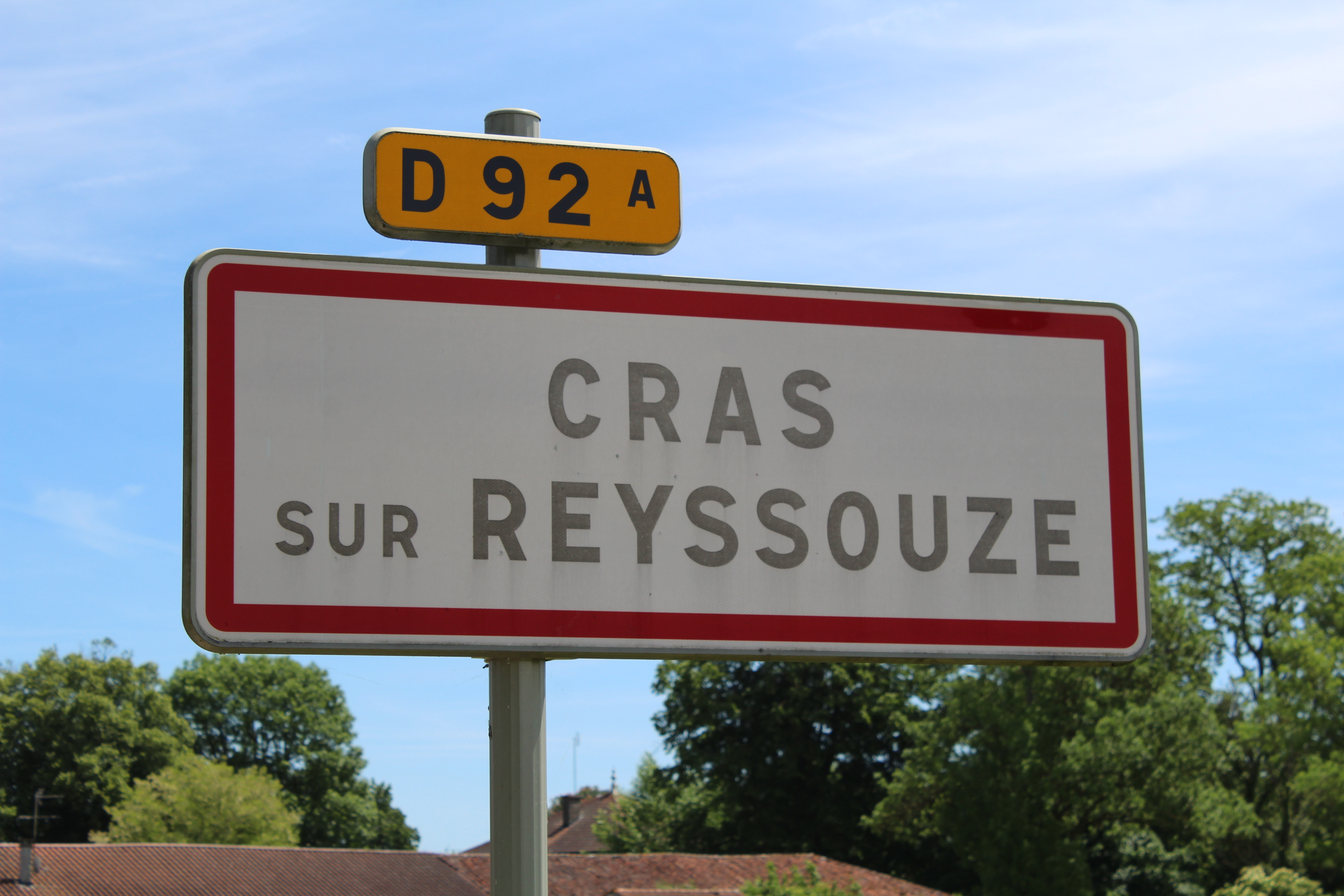 Panneau d'entrée dans Mantenay-Montlin.